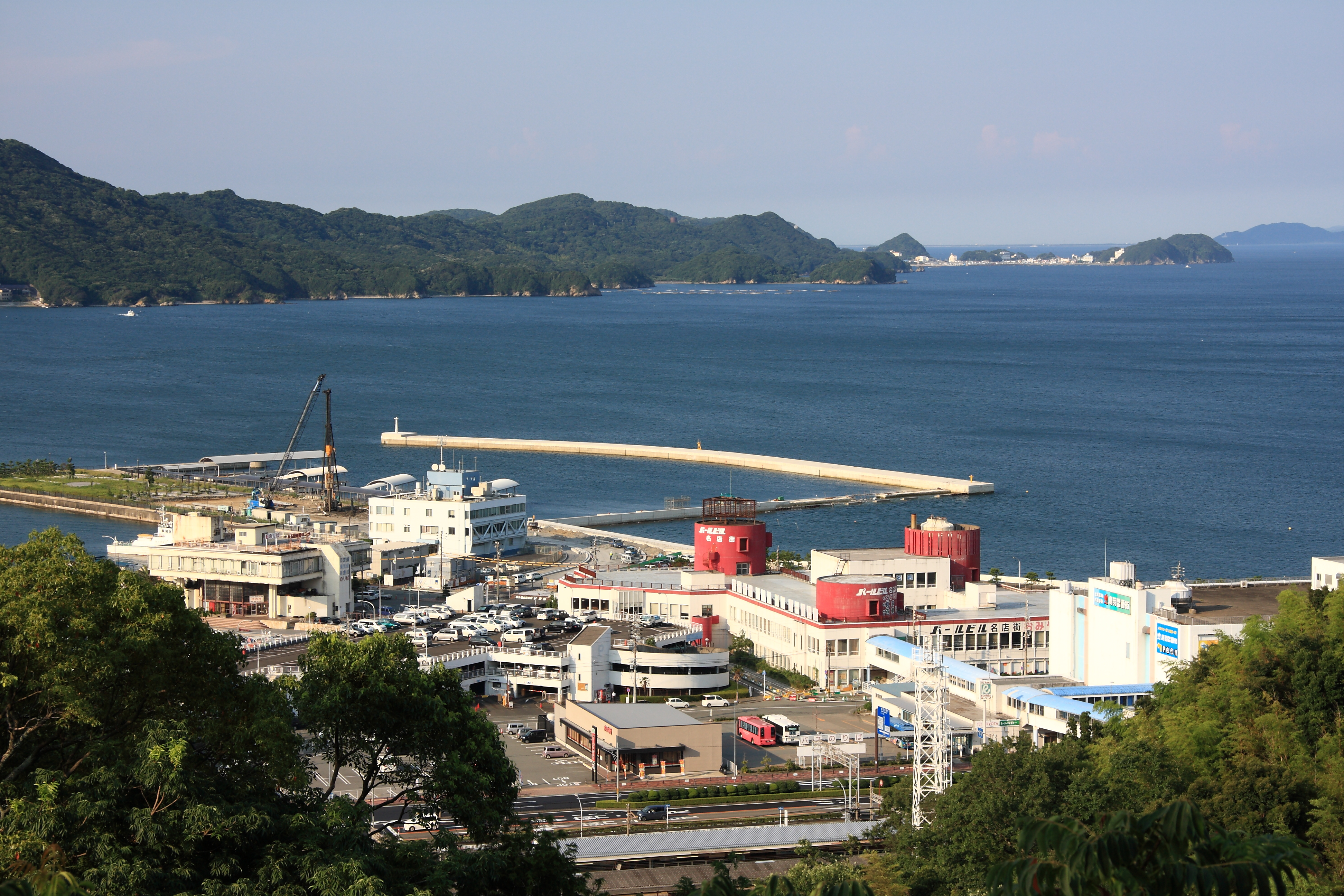 左側.建設中の鳥羽マリンターミナル 右側.パールビル名店街（閉鎖） 日和山展望台から撮影 Canon EOS 40D